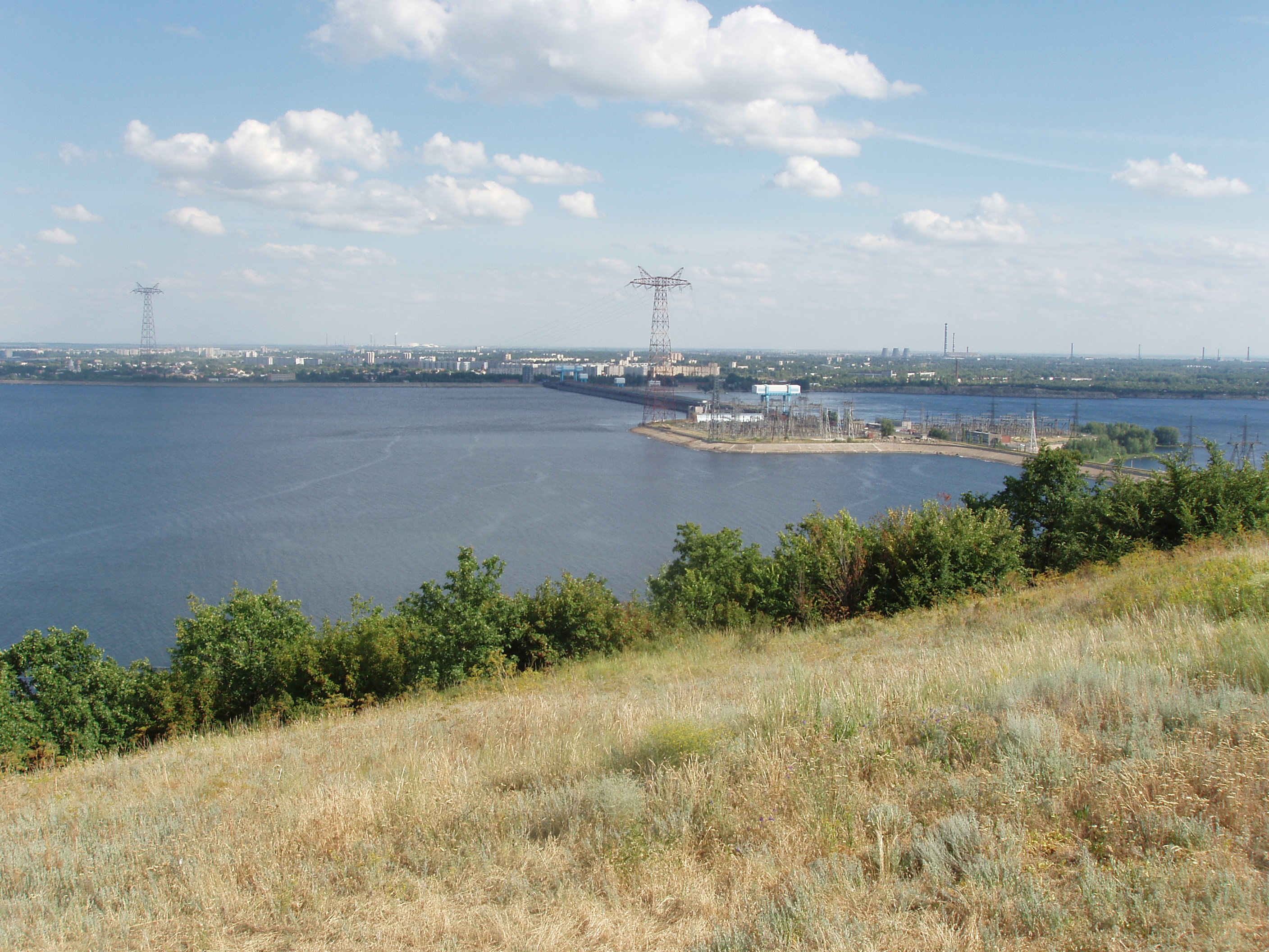 Саратовская ГЭС (Балаково)